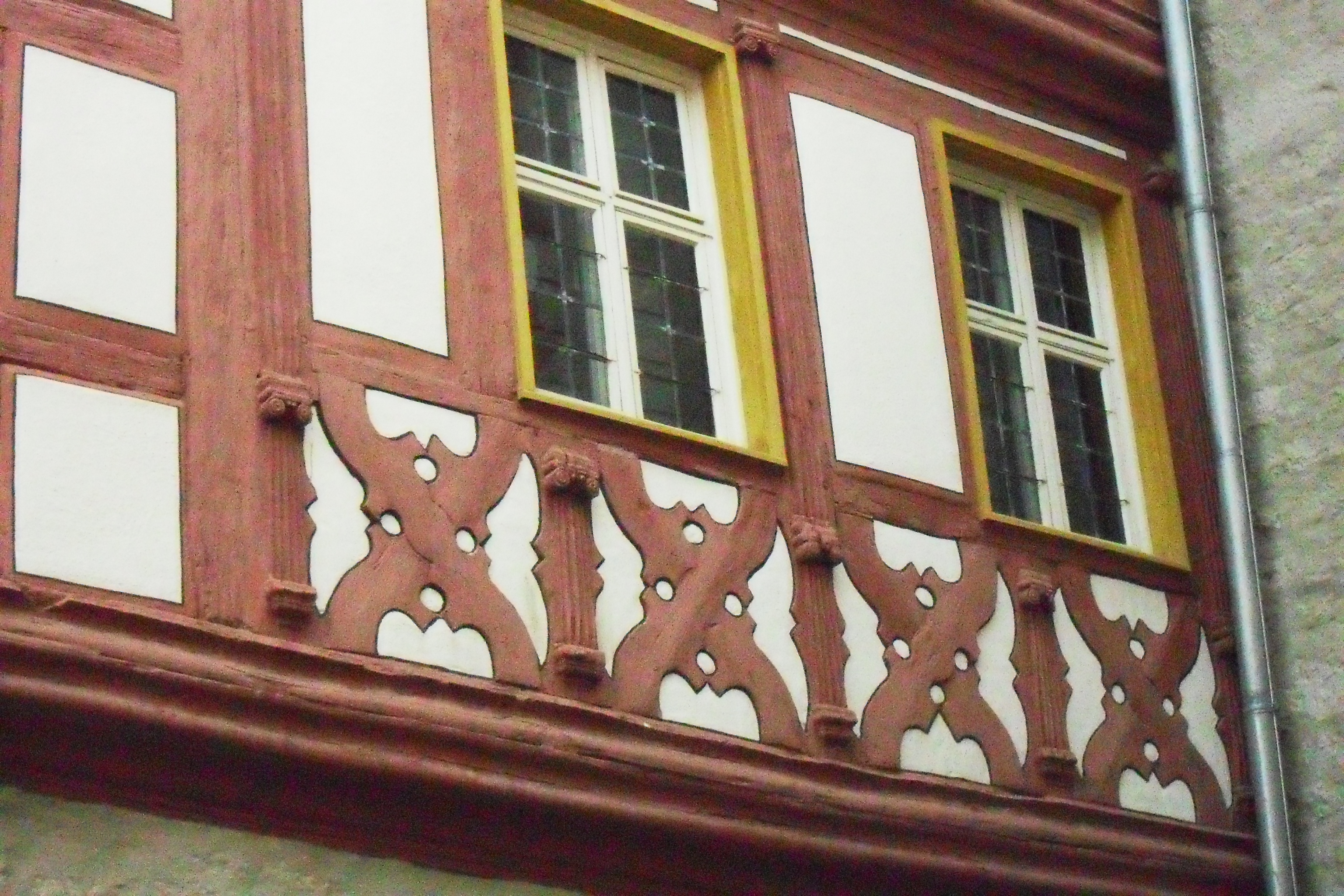 Schmuckfachwerk am Romschloessle in Creglingen